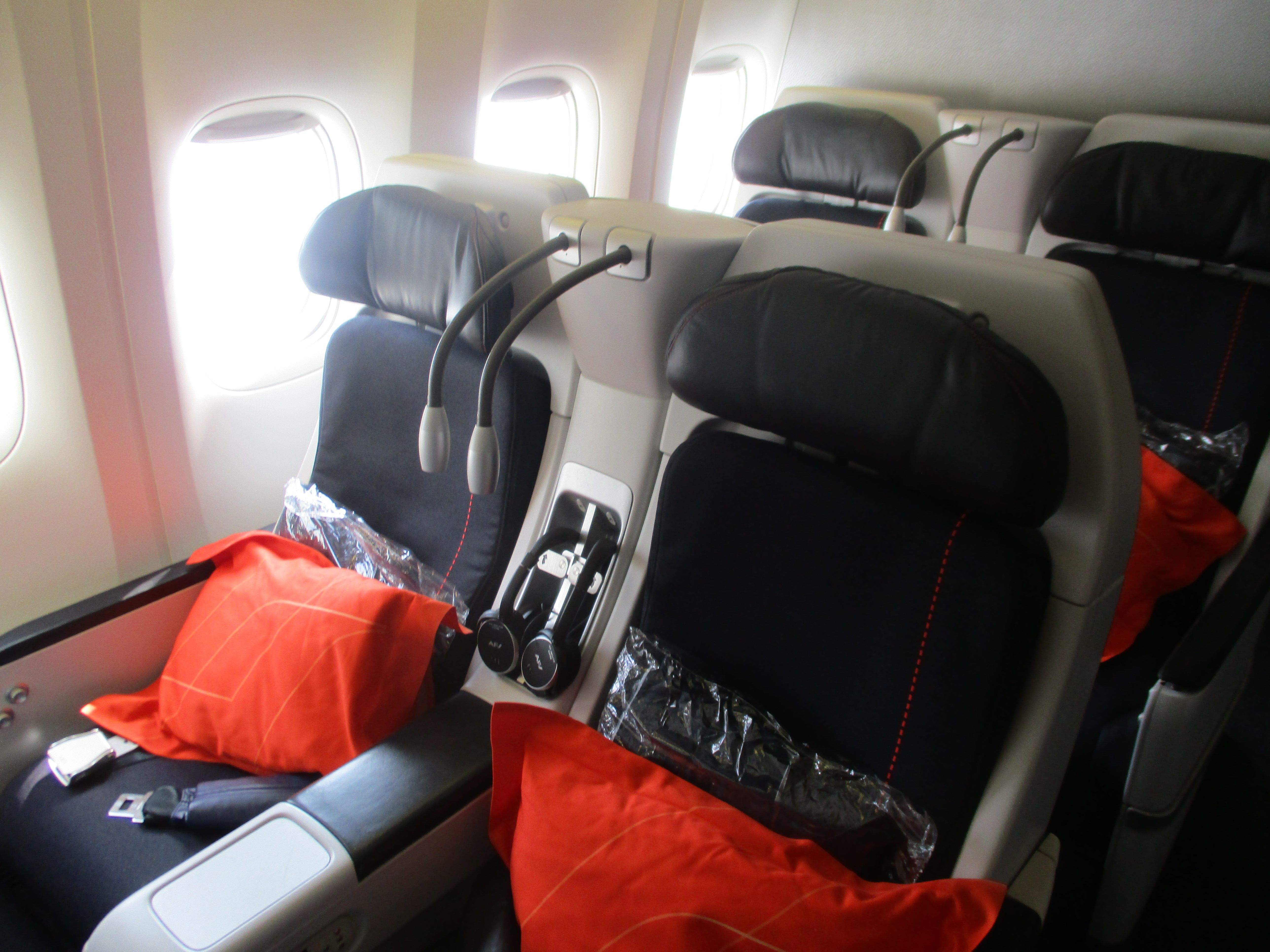 パリ発羽田行きの便に搭乗した際に撮影